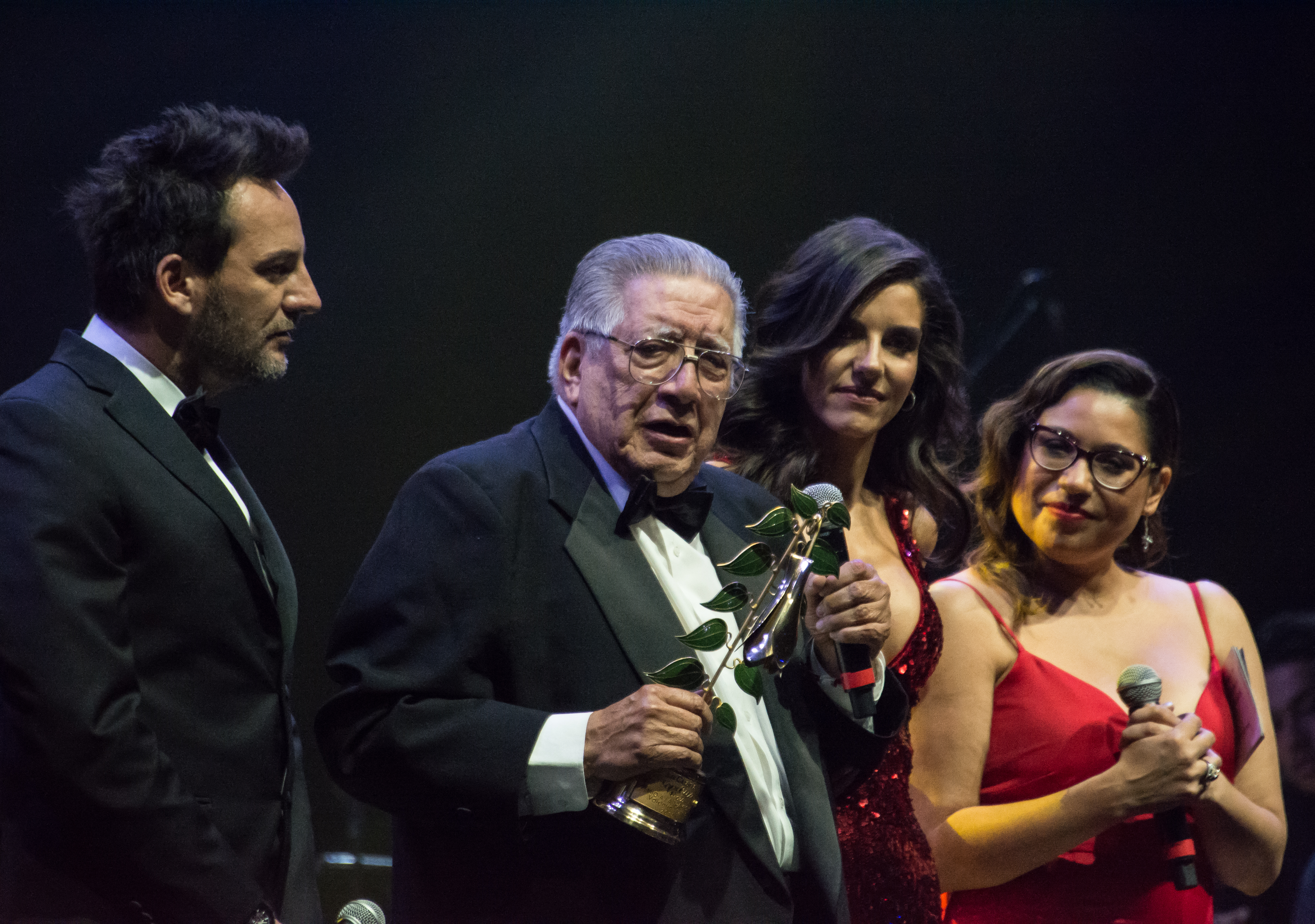 Daniel Fuenzalida, Valentín Trujillo, María Luisa Godoy y Alejandra Valle, Copihue de Oro 2018, Sun Monticello, Mostazal, Región de O'Higgins, Chile